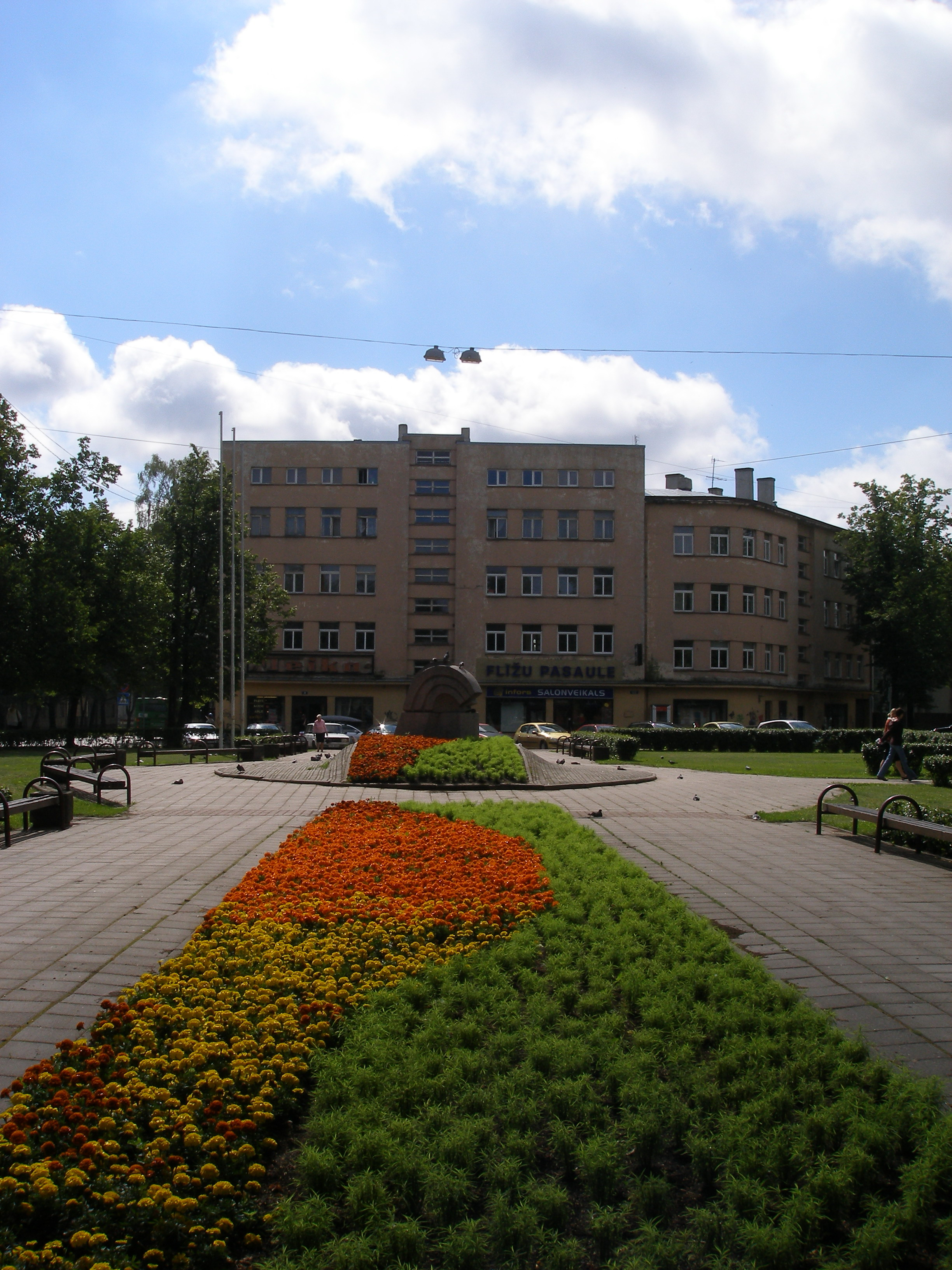 Zemitāna laukums no Brīvības gatves puses. Otrā laukuma pusē - kinoteātra "Teika" ēka.